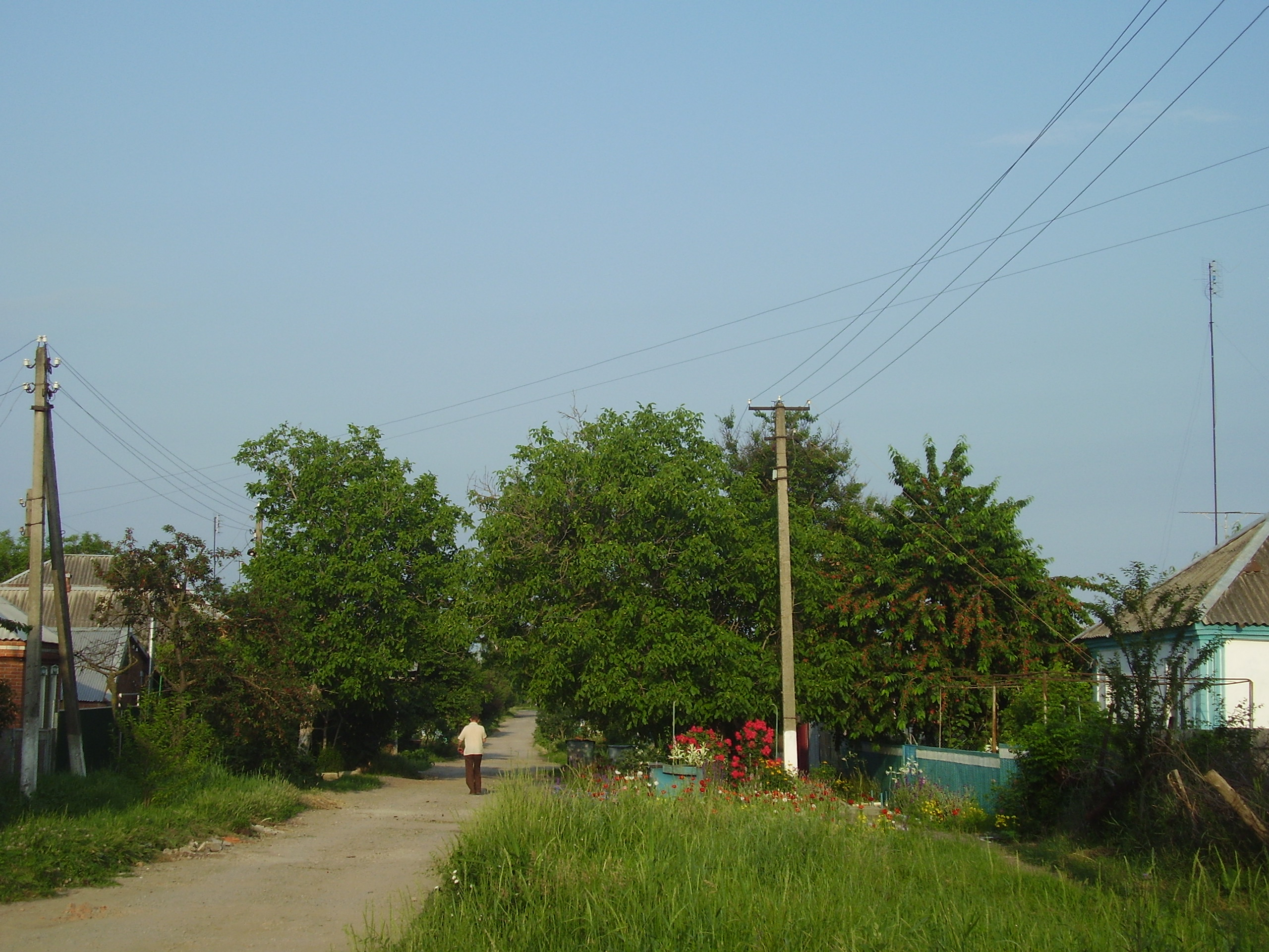 Тимашёвск. Улица в частном секторе в районе монастыря.